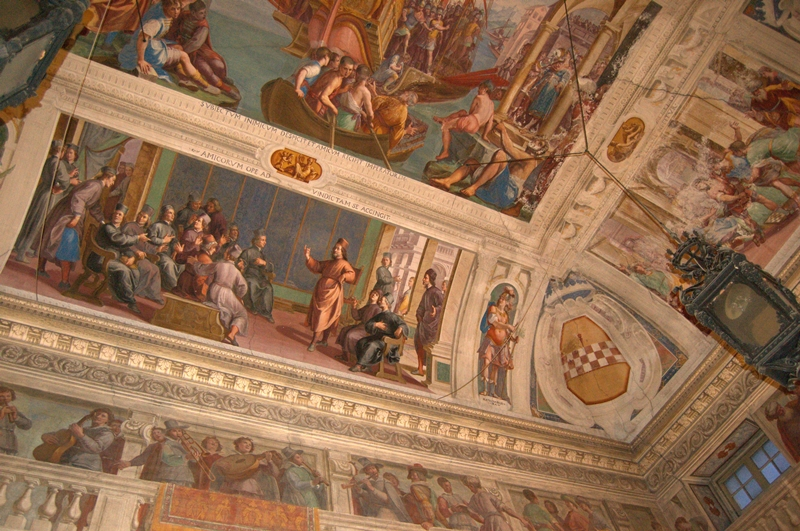 Villa Spinola di San Pietro This is a photo of a monument which is part of cultural heritage of Italy.